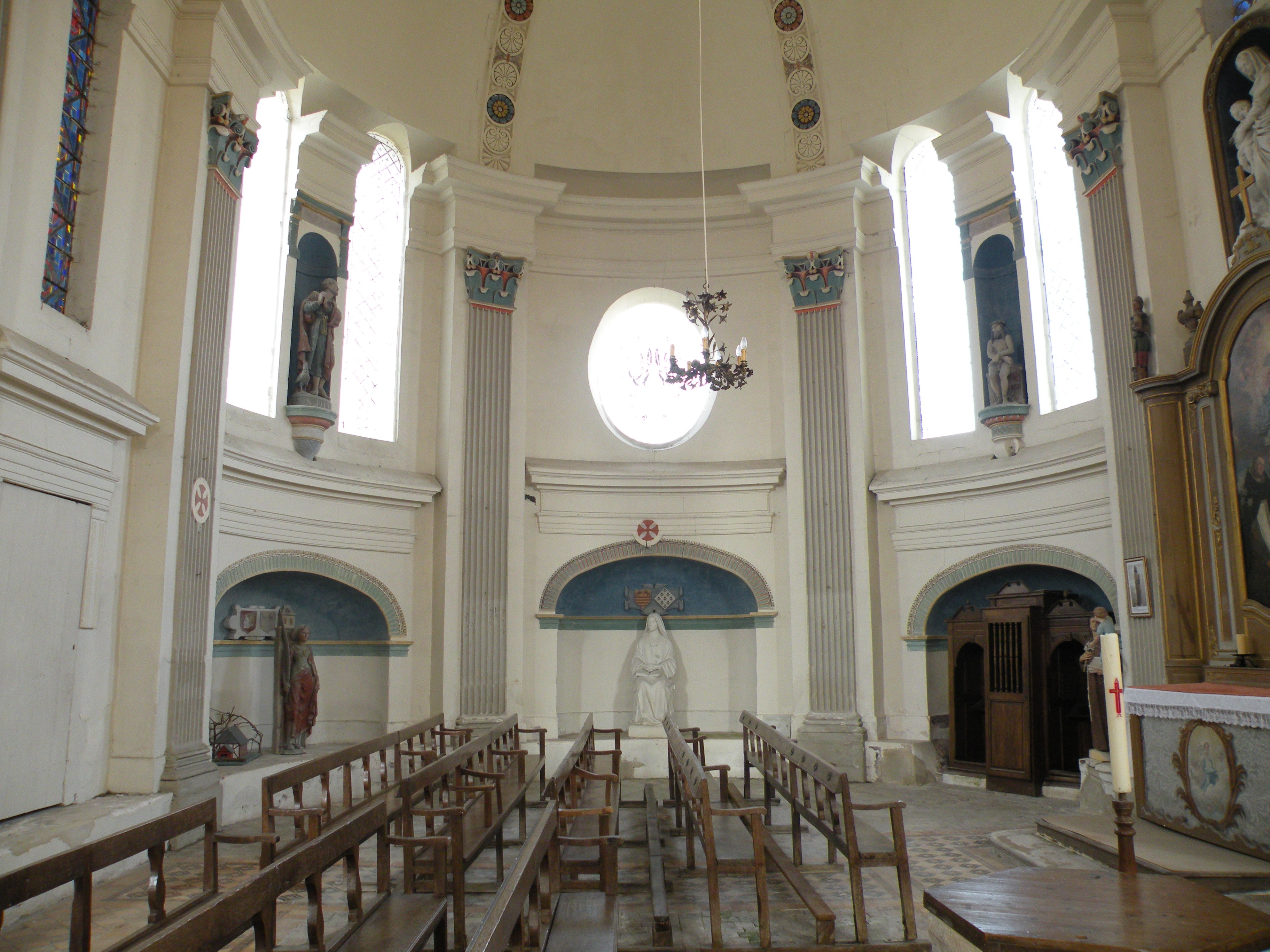 Intérieur de l'église Saint-Pierre et Saint-Paul de Jouy-sous-Thelle